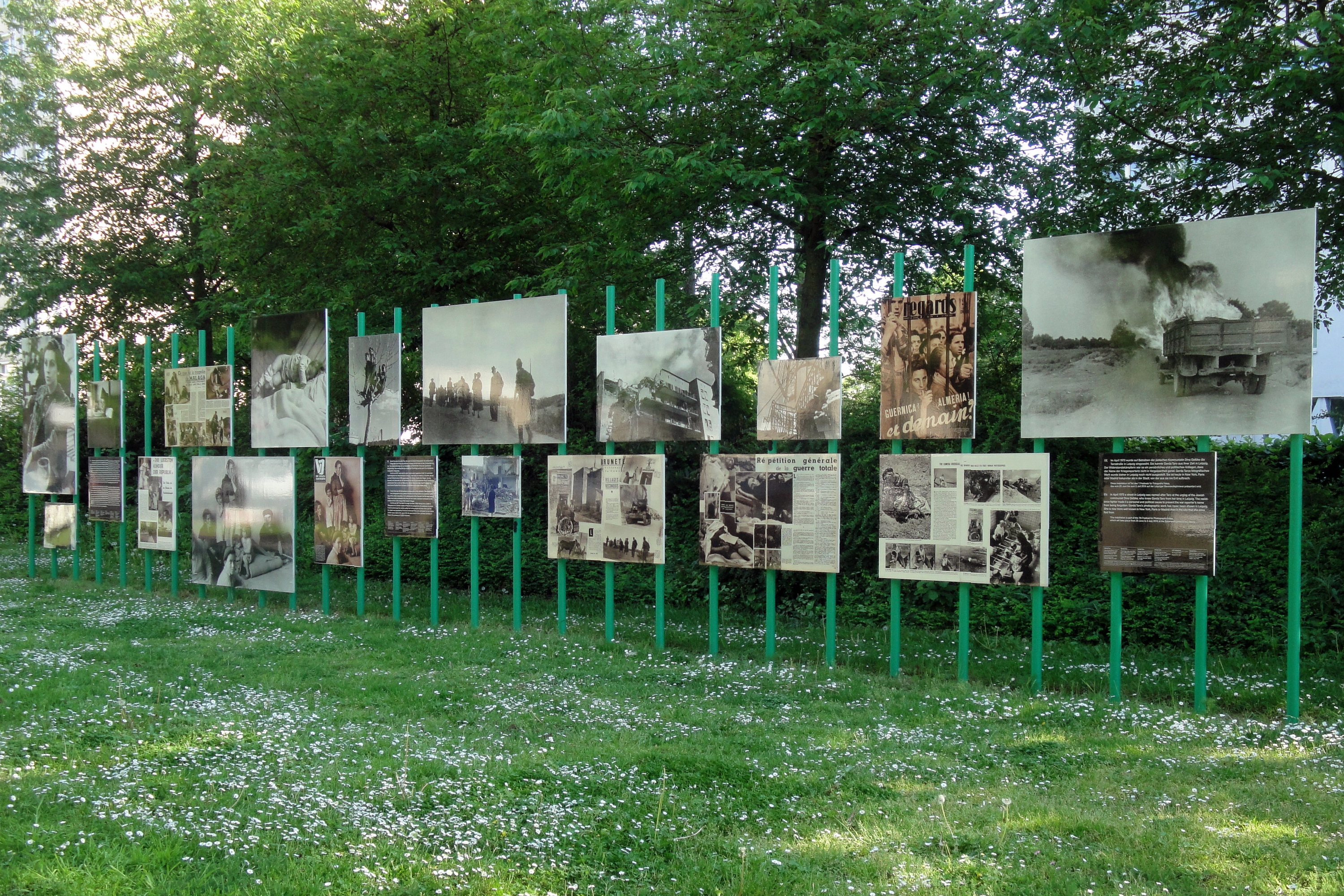 Tafeln mit Fotos von Gerda Taro, Straße des 18. Oktober, Leipzig